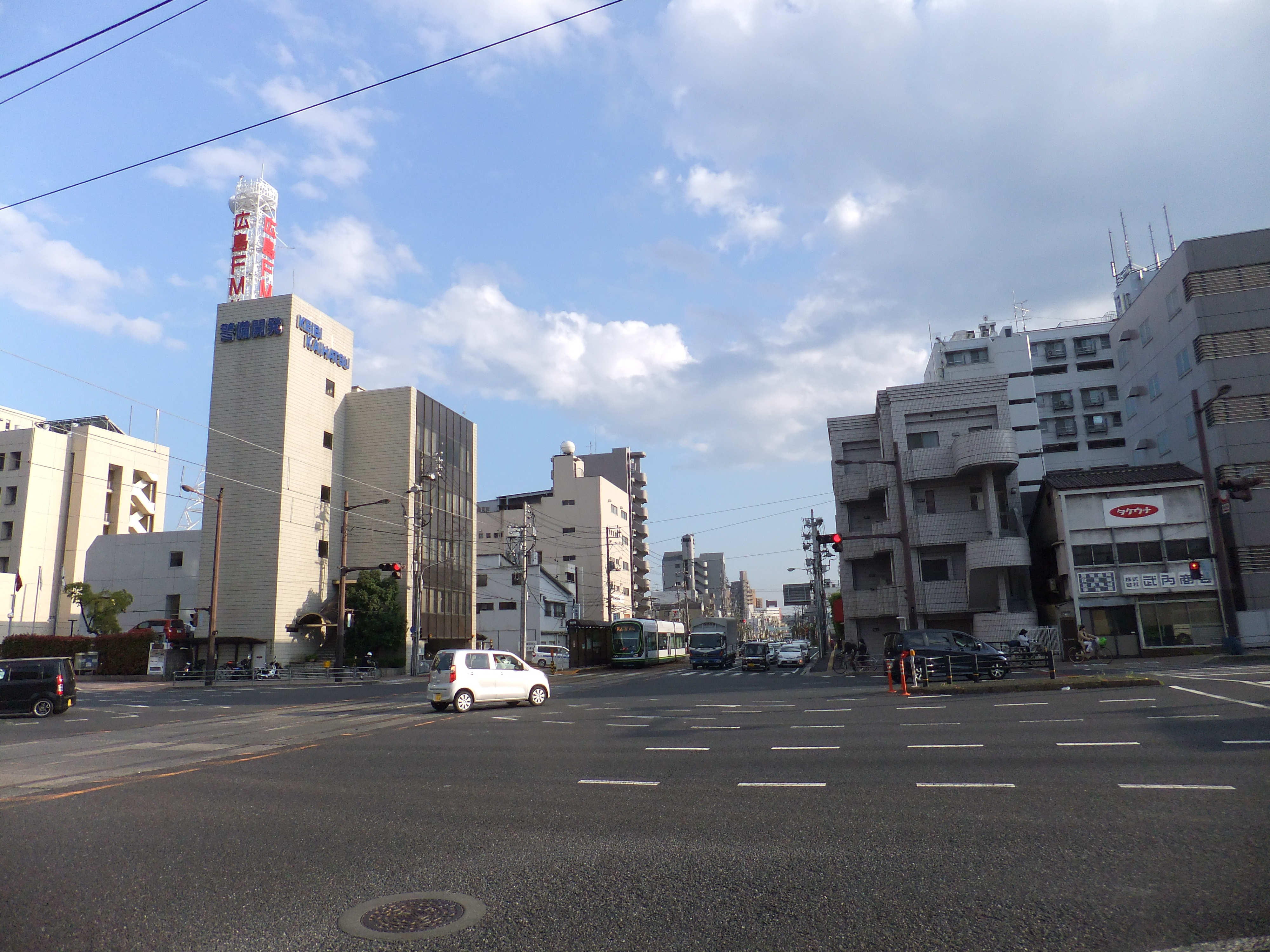 国道487号線終点・平野橋東交差点